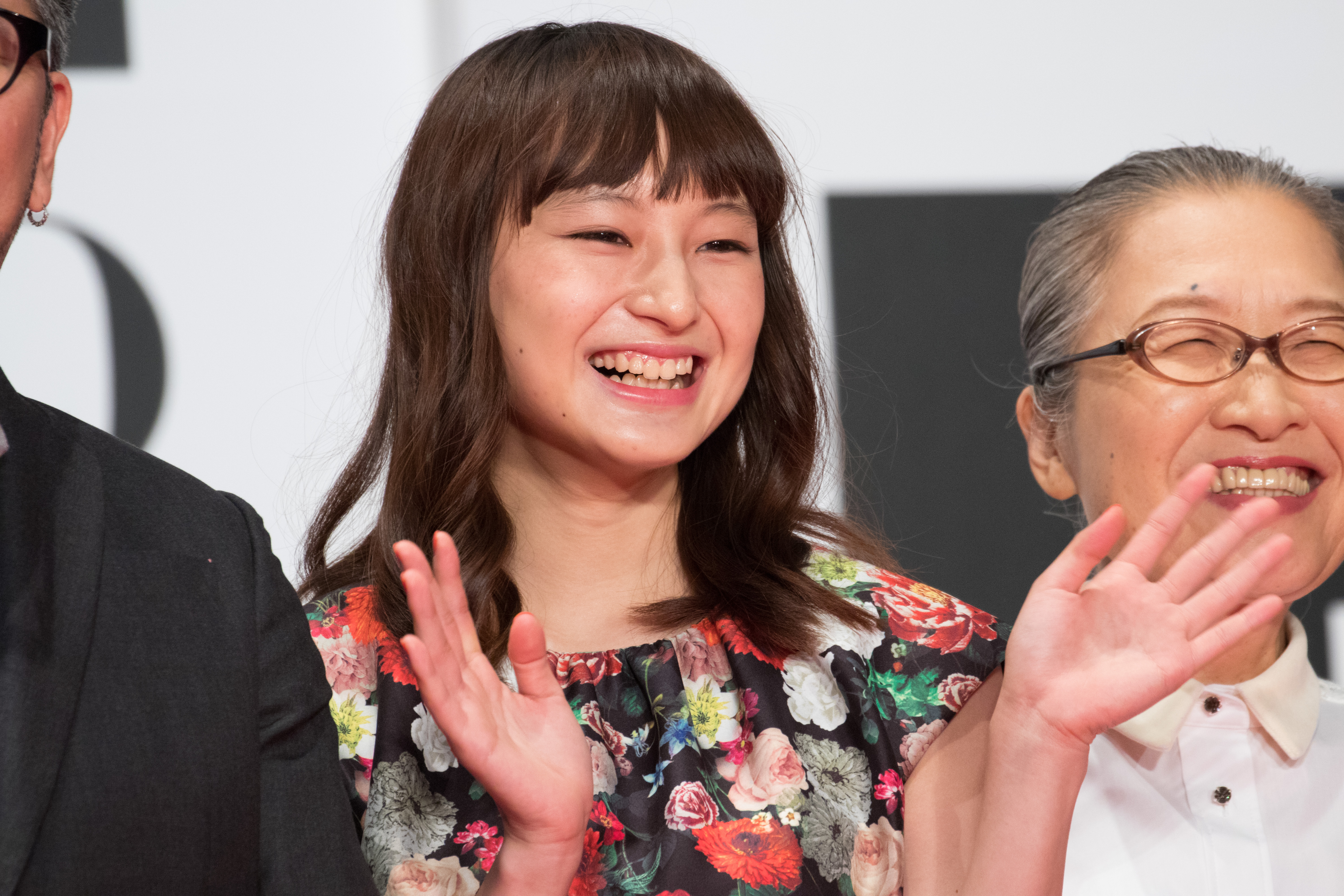 第29回 東京国際映画祭 オープニングセレモニー 萩原みのり (ハローグッバイ)